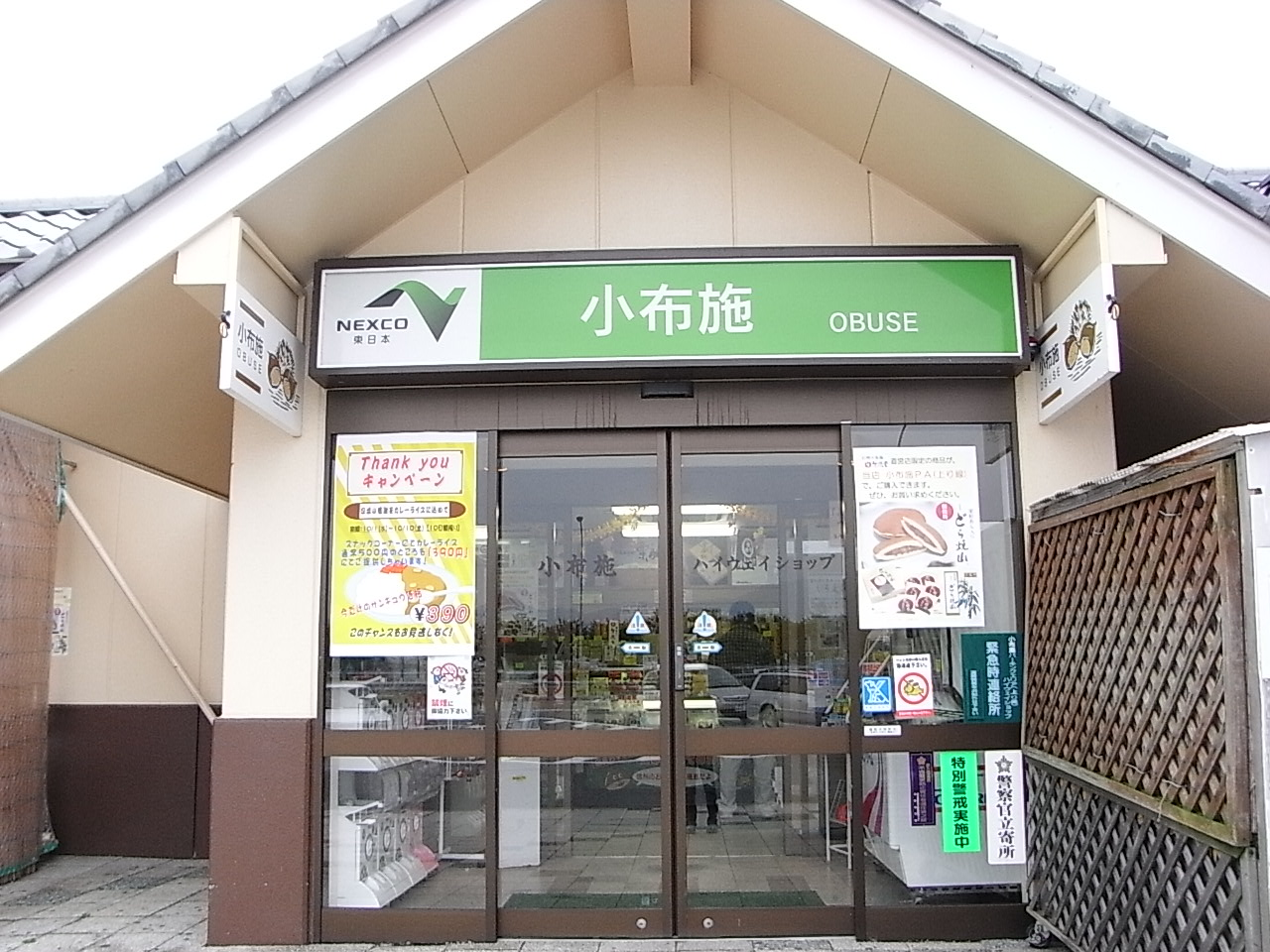 小布施PAの写真